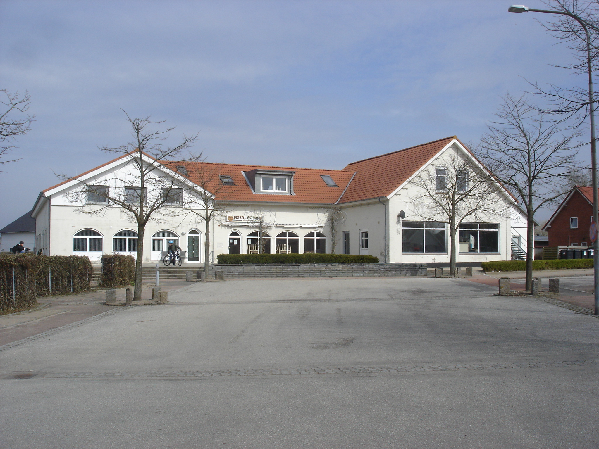 Guderup Station, set fra Torvet